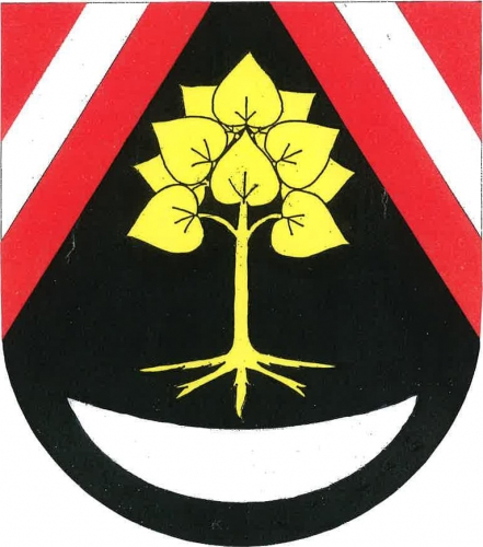 znak, Lhotice, okres Třebíč